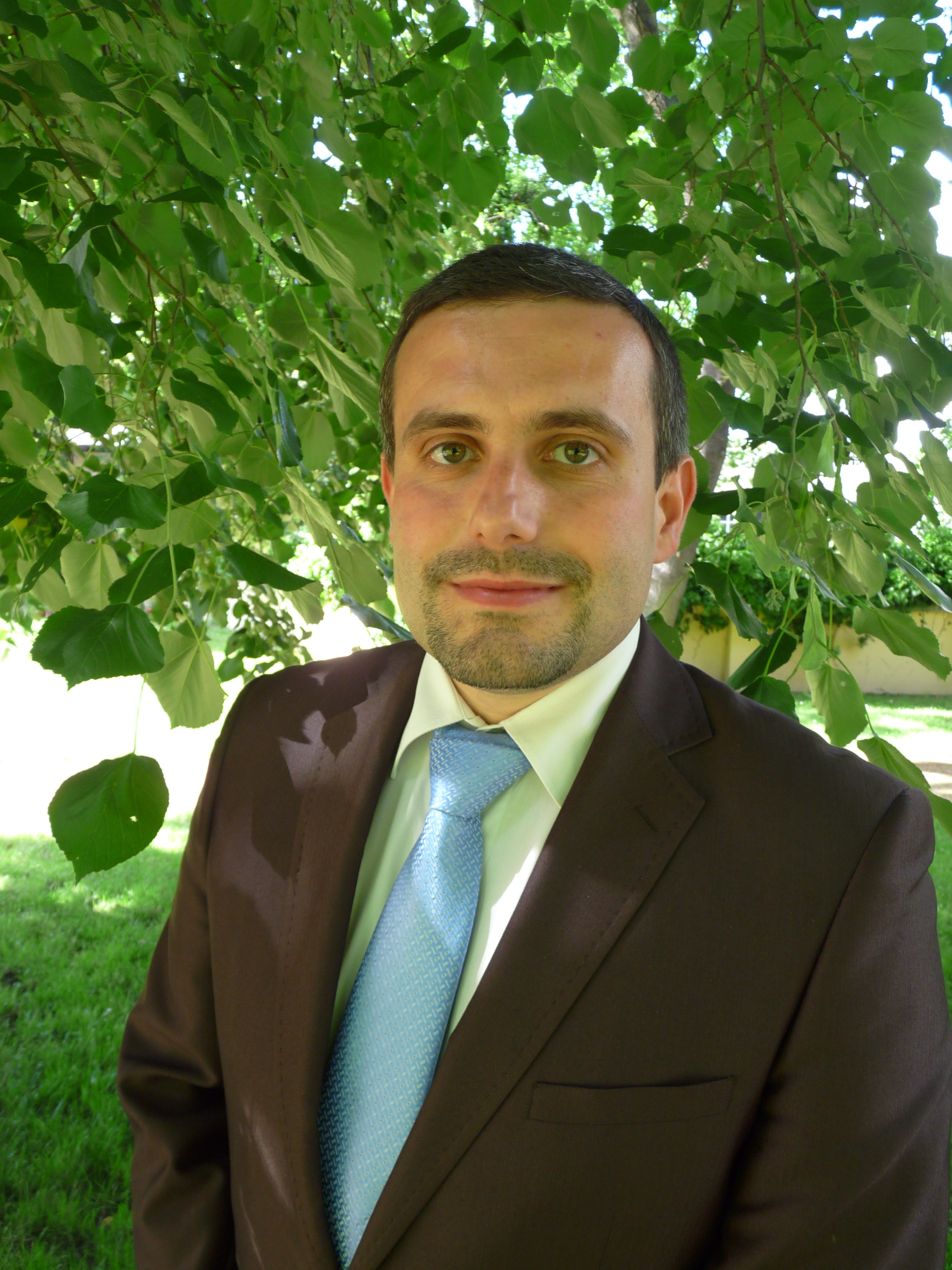 Martin Ferus - fyzikální chemik, Dr.